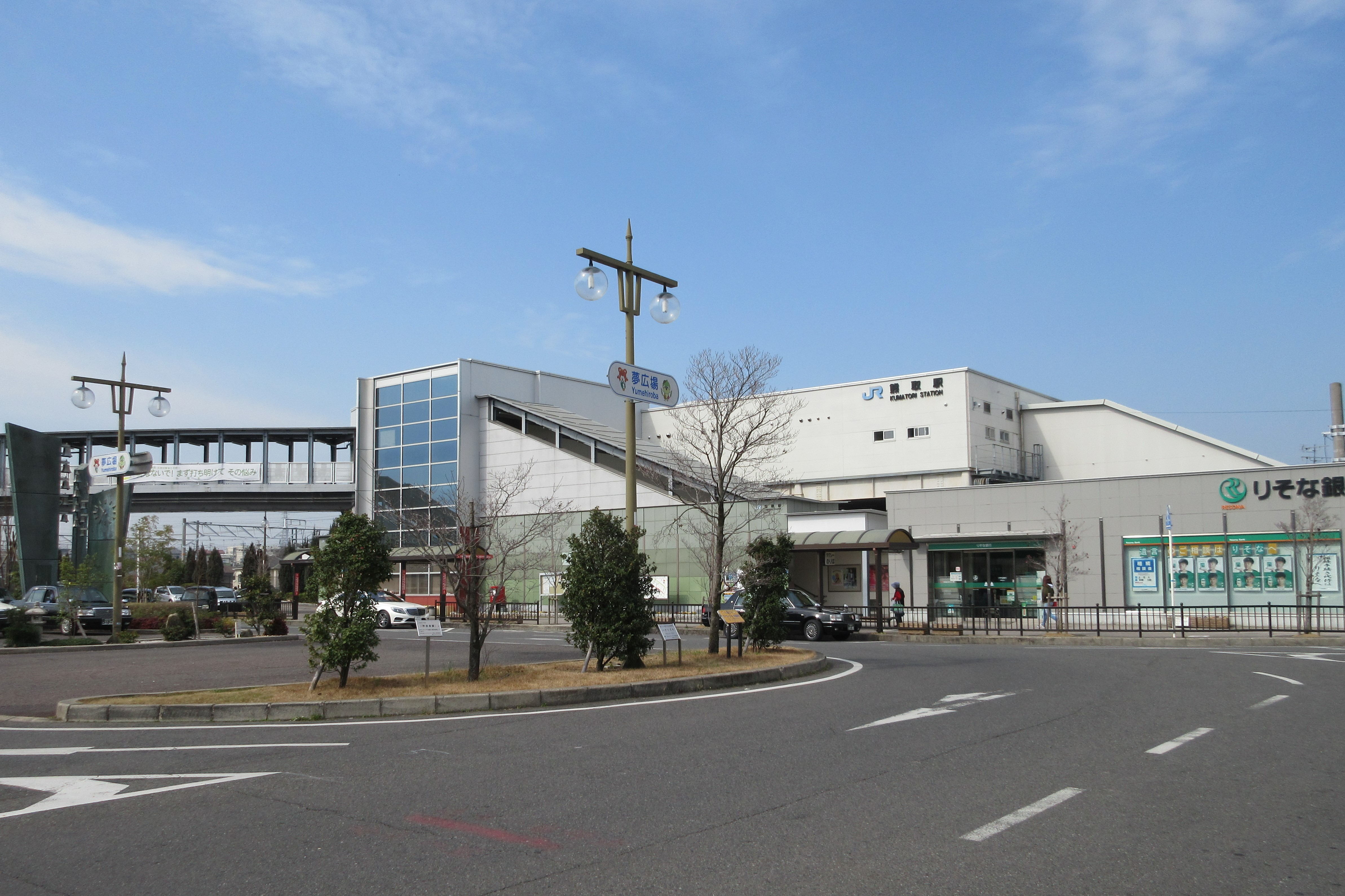 JR熊取駅